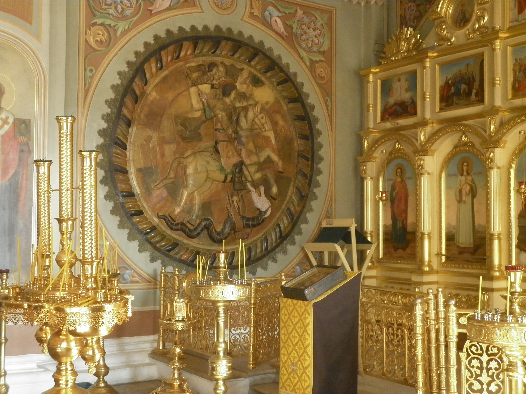 Собор Успенский (Москва и Московская область, Дмитров, Историческая площадь, 11)